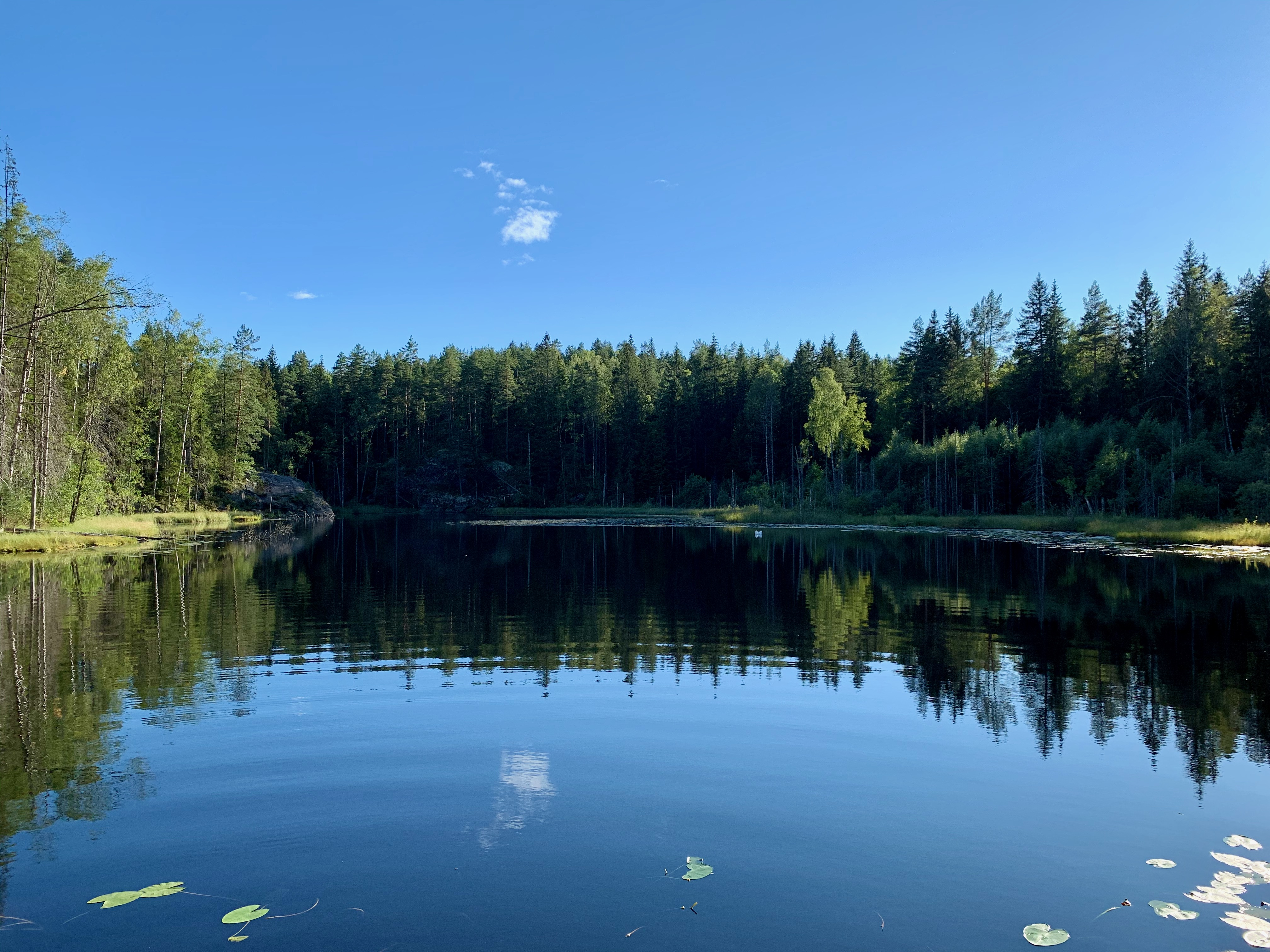 Sølvdobla i Østmarka i Oslo.